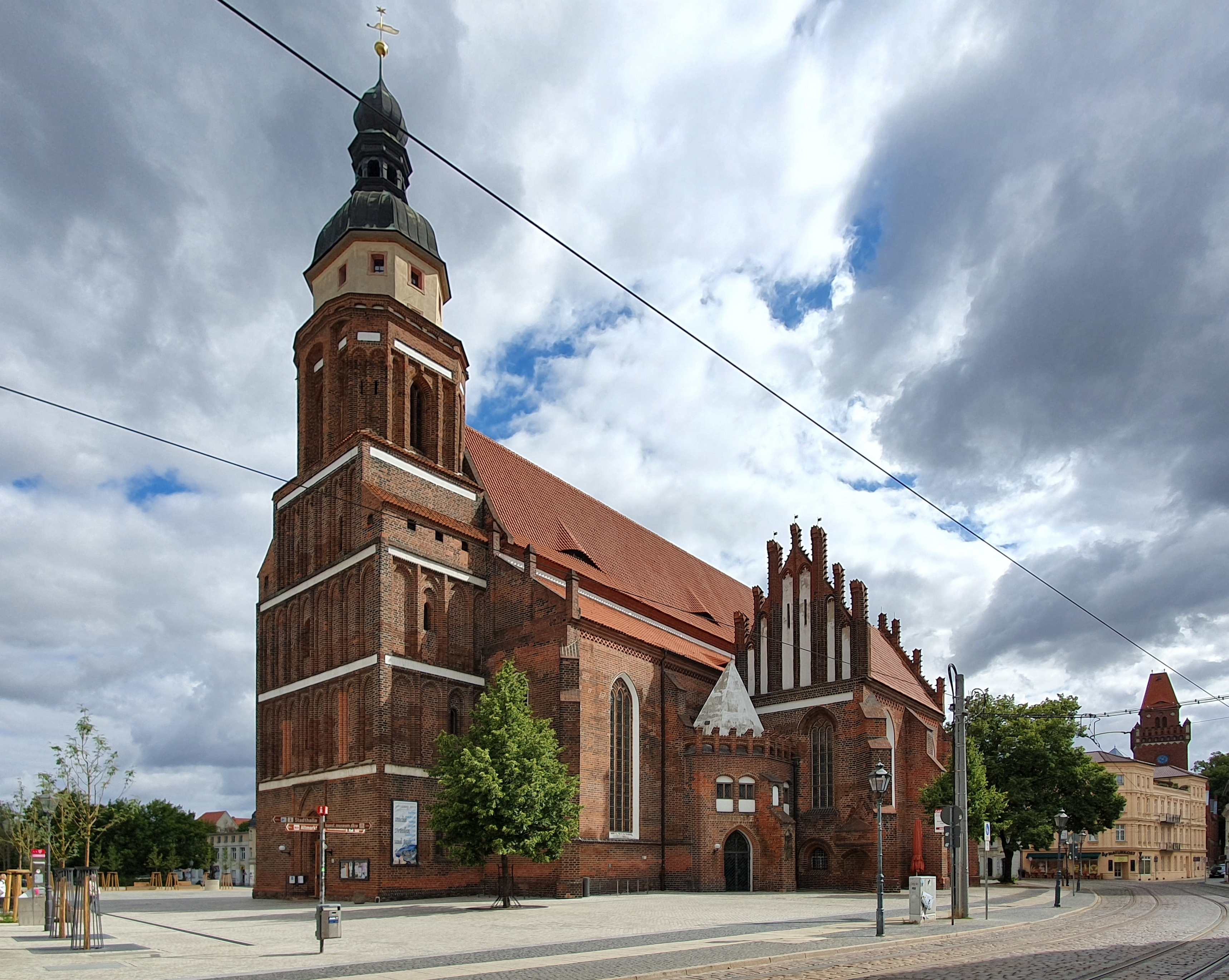 Oberkirche Sankt Nikolai, Cottbus nach der Erneuerung des Vorplatzes, Juli 2019